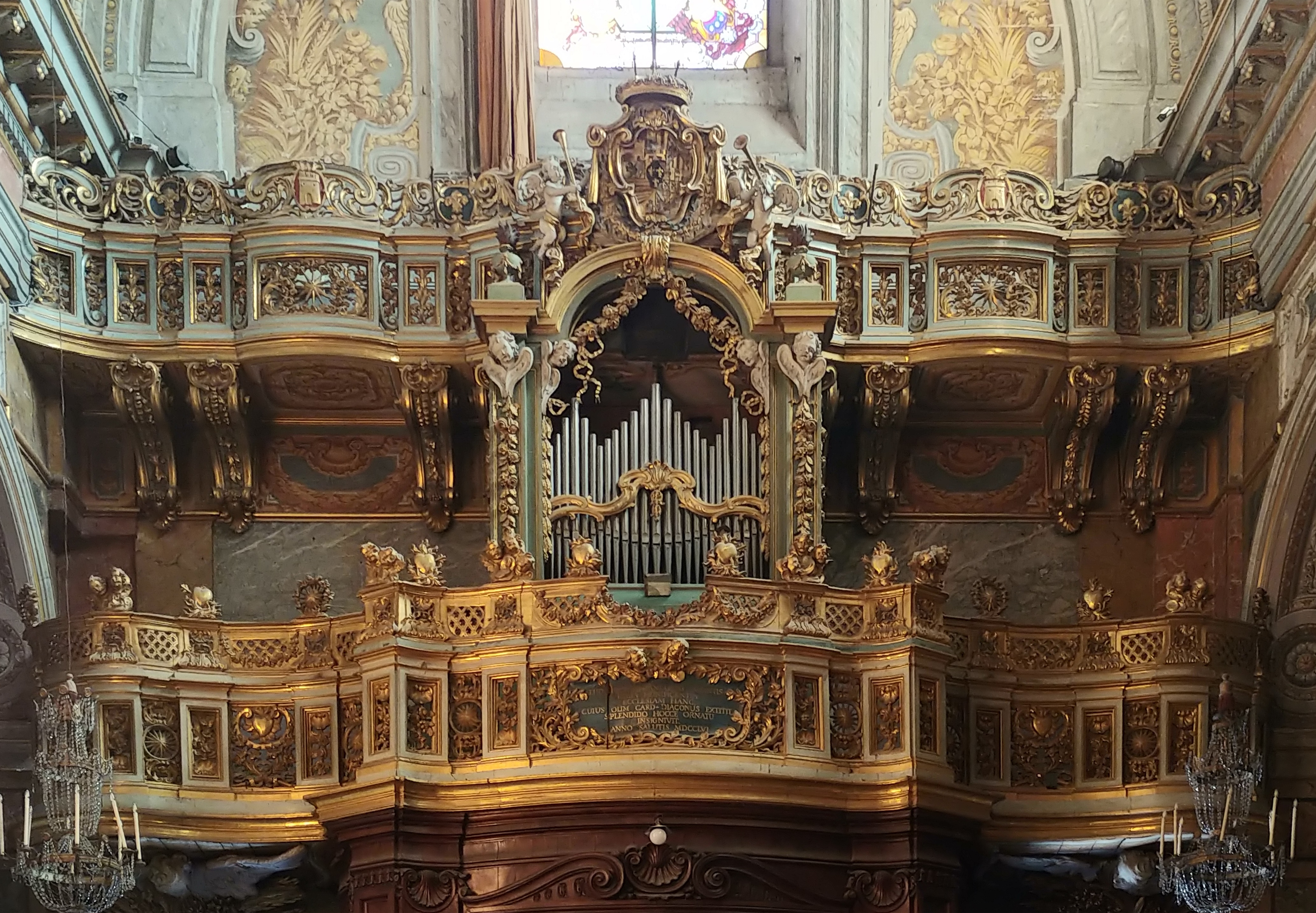 Le due cantorie sovrapposte e l'organo a canne.